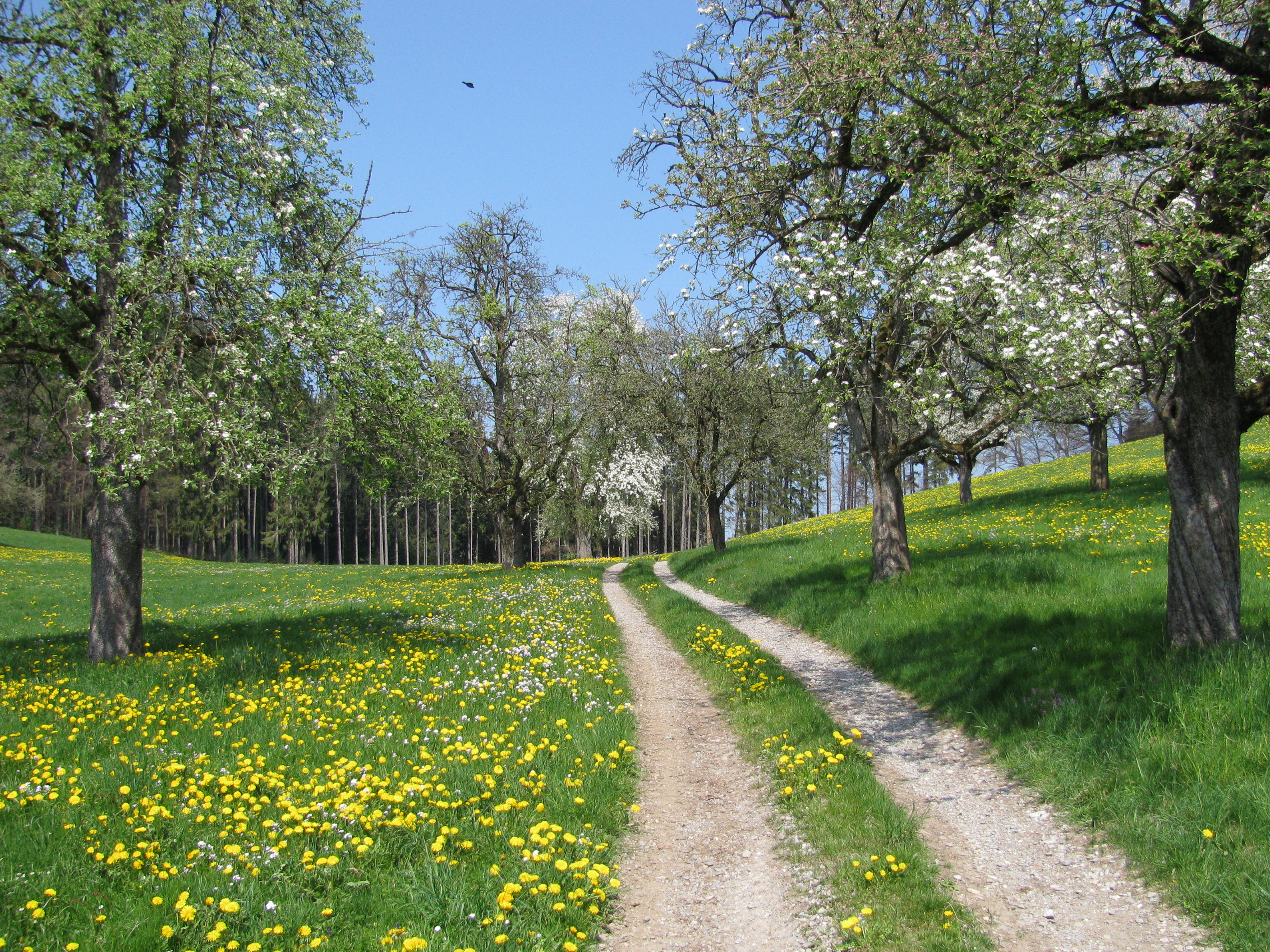 Deutschland - Baden-Württemberg - Bodenseekreis - Neukirch - Unterlangensee: Wirtschaftsweg nach Neukirch / "Jubiläumsweg"